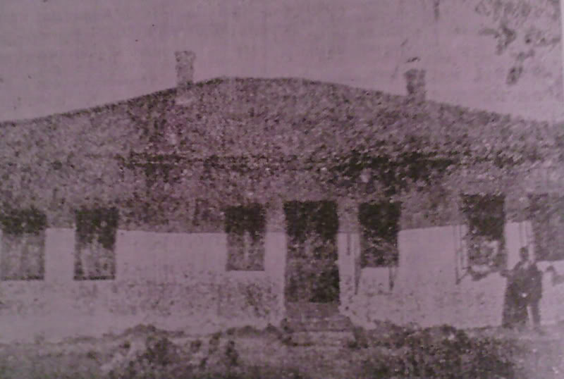 Srpski (latinica): Stara zgrada Prve niške gimnazije u Jeronimovoj ulici